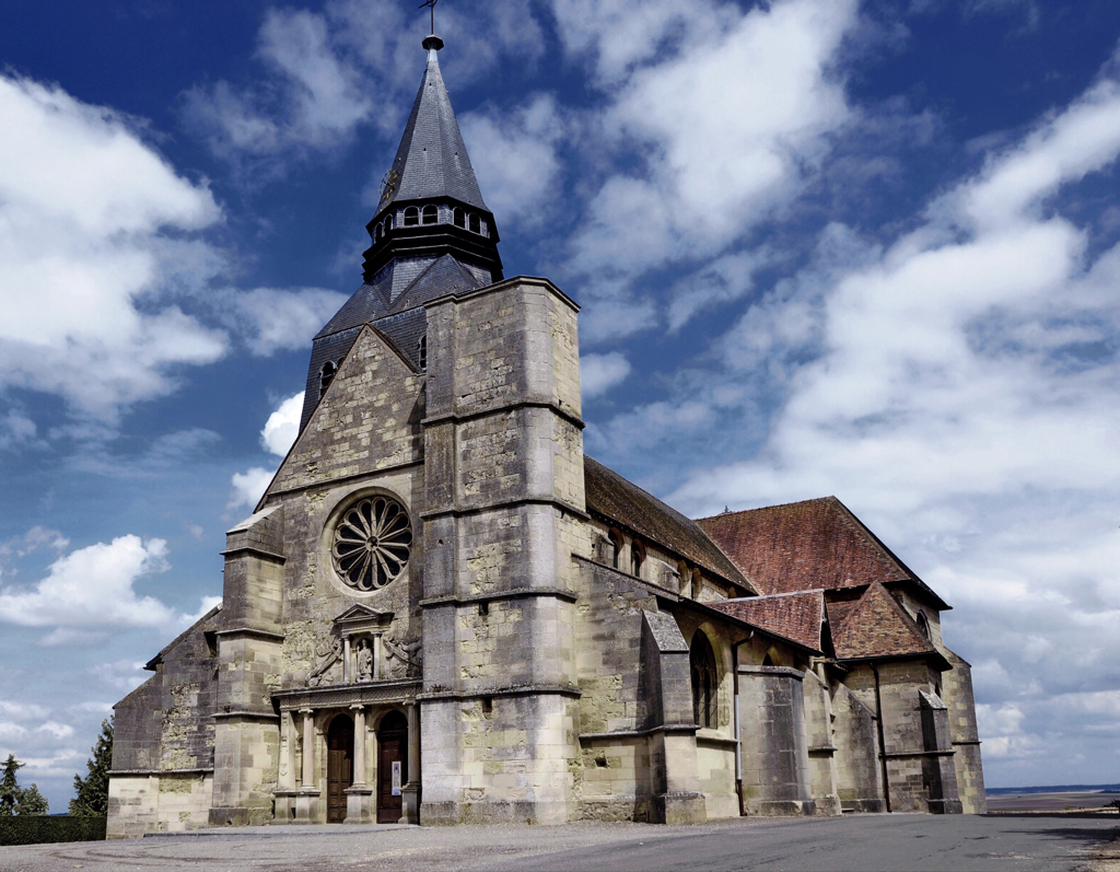 Église Saint-Didier de Clermont-en-Argonne .